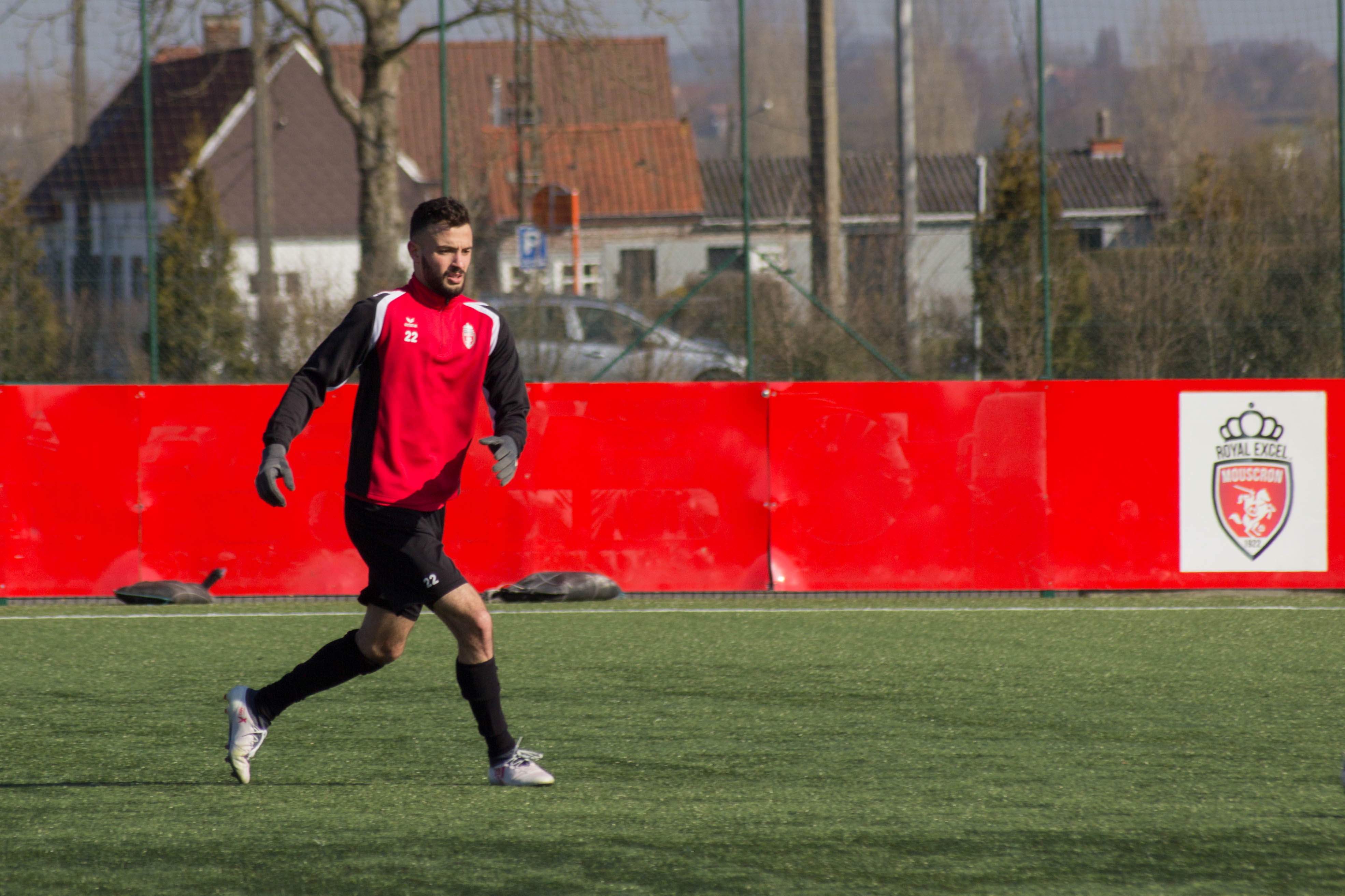 Entraînement du Royal Excel Mouscron, au Futurosport( Mouscron). Le 22 février 2018.